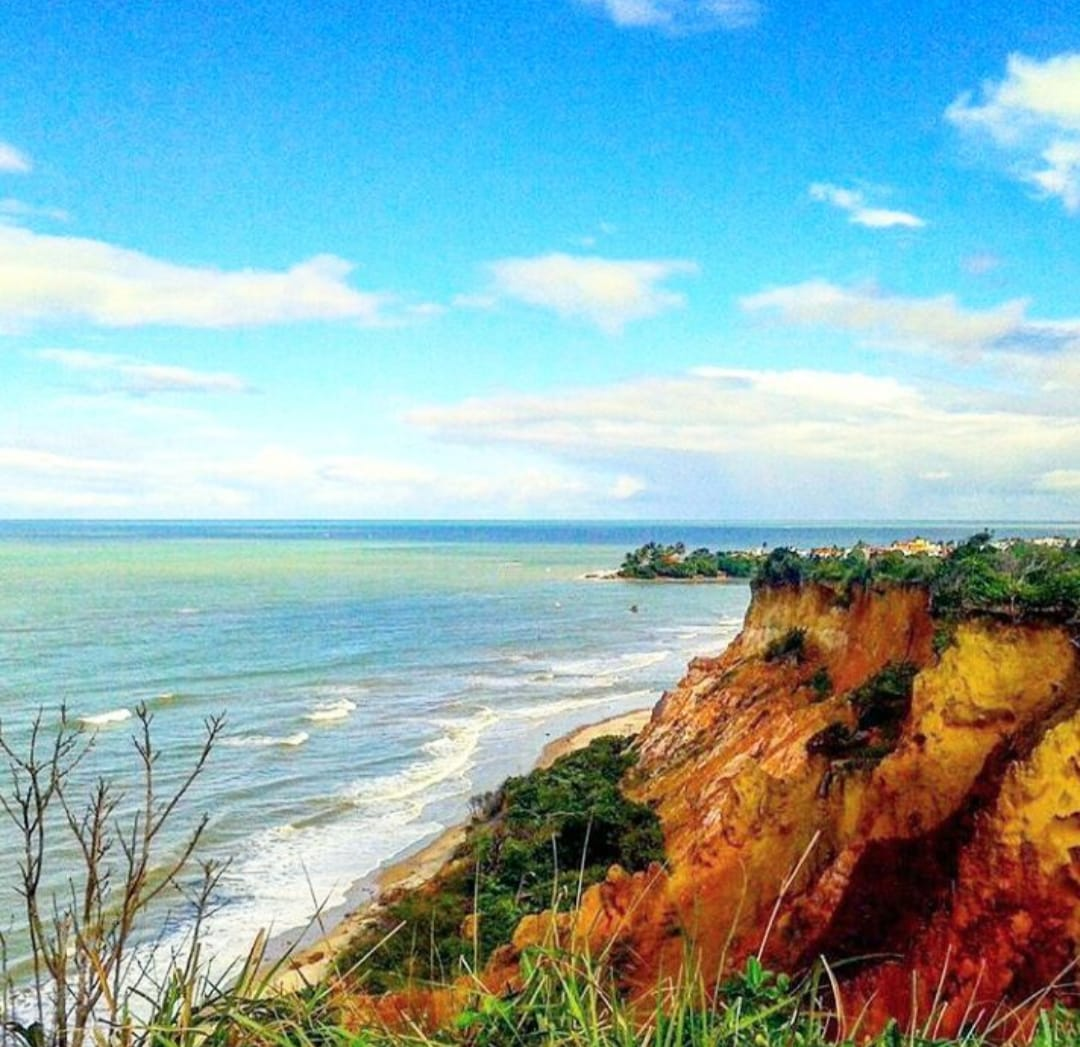 Praia do amor conde paraiba